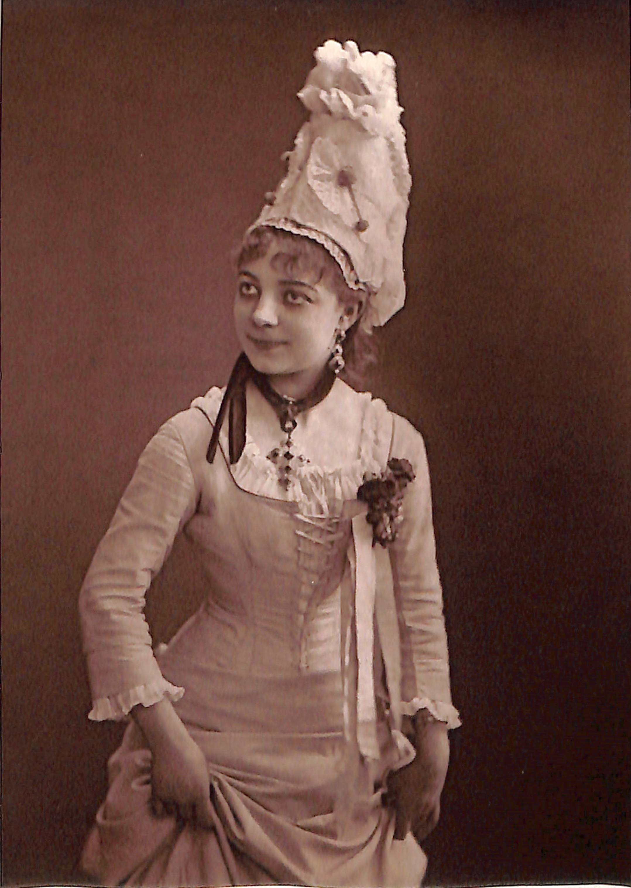 Juliette Simon-Girard du Théâtre des Folies-Dramatiques